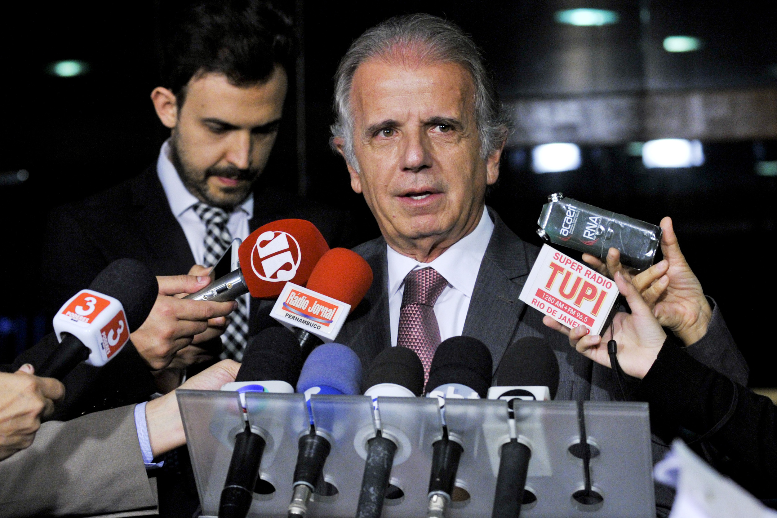 Ministro José Múcio Monteiro Filho concede entrevista. Foto: Jane de Araújo/Agência Senado